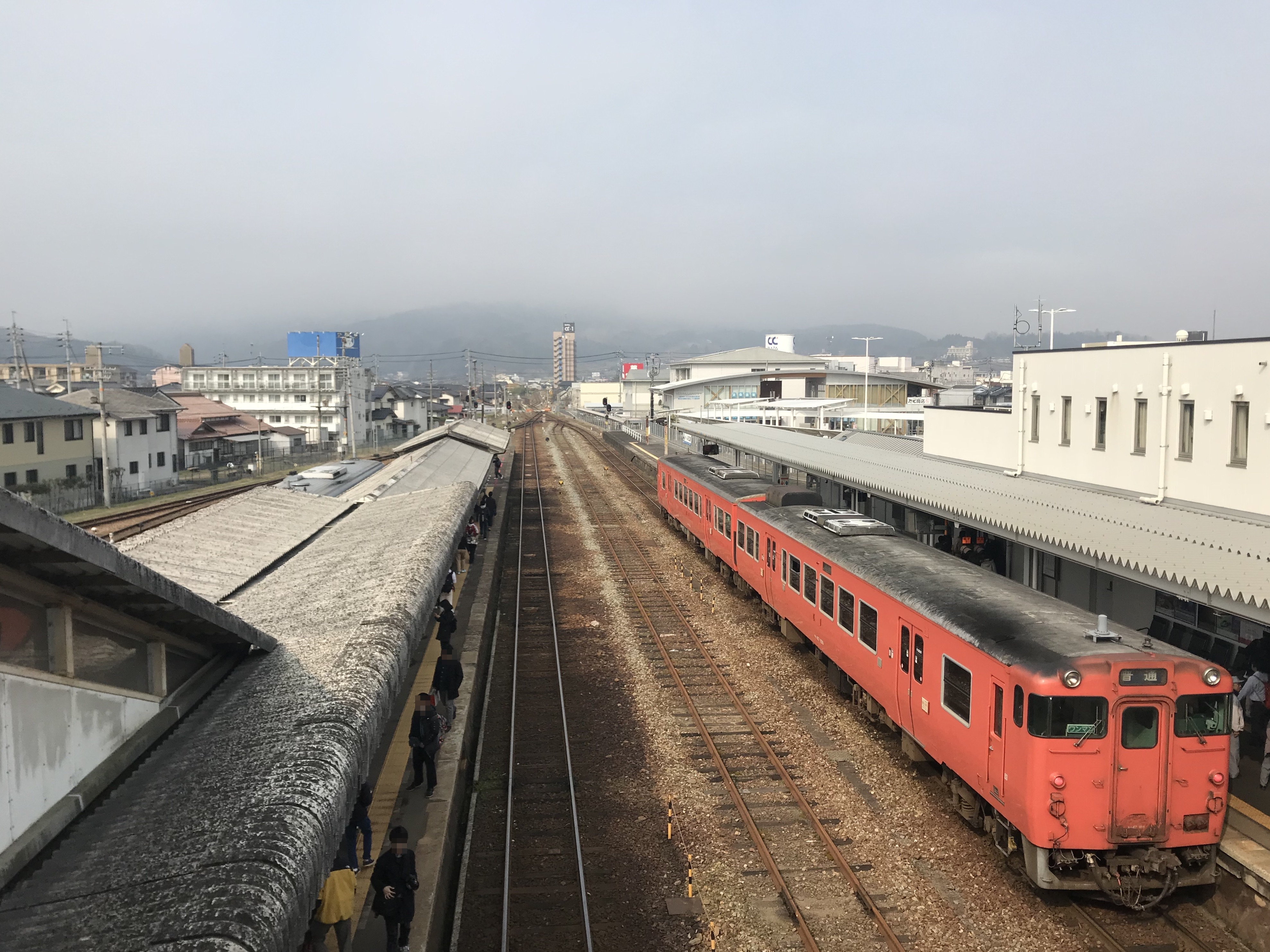 三次駅の跨線橋より望む西三次・尾関山方面